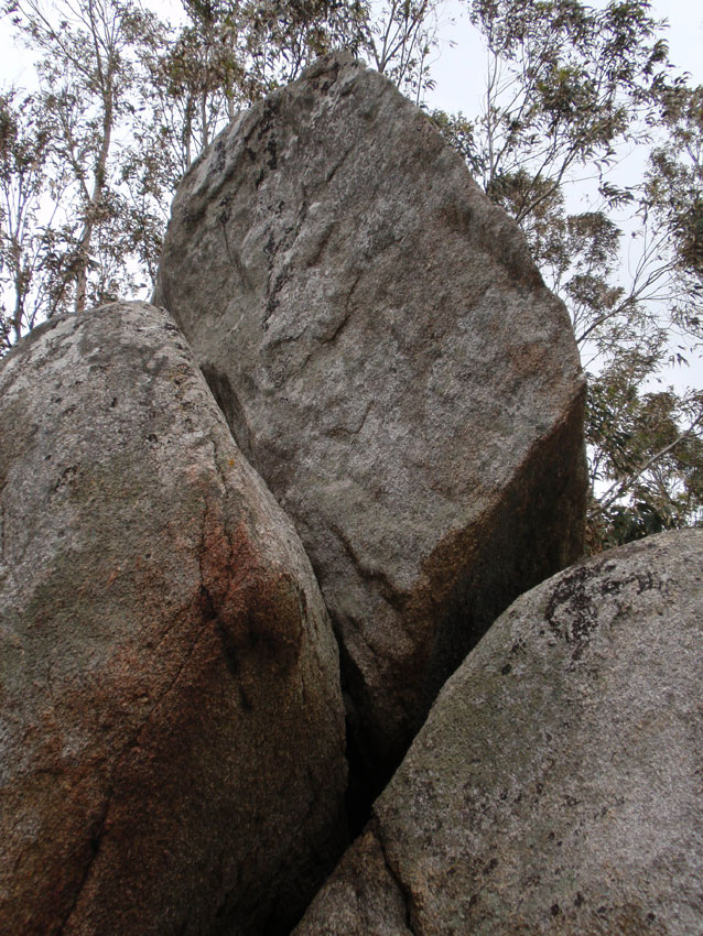 Imagem da Pena Molexa (Narom, Galiza)